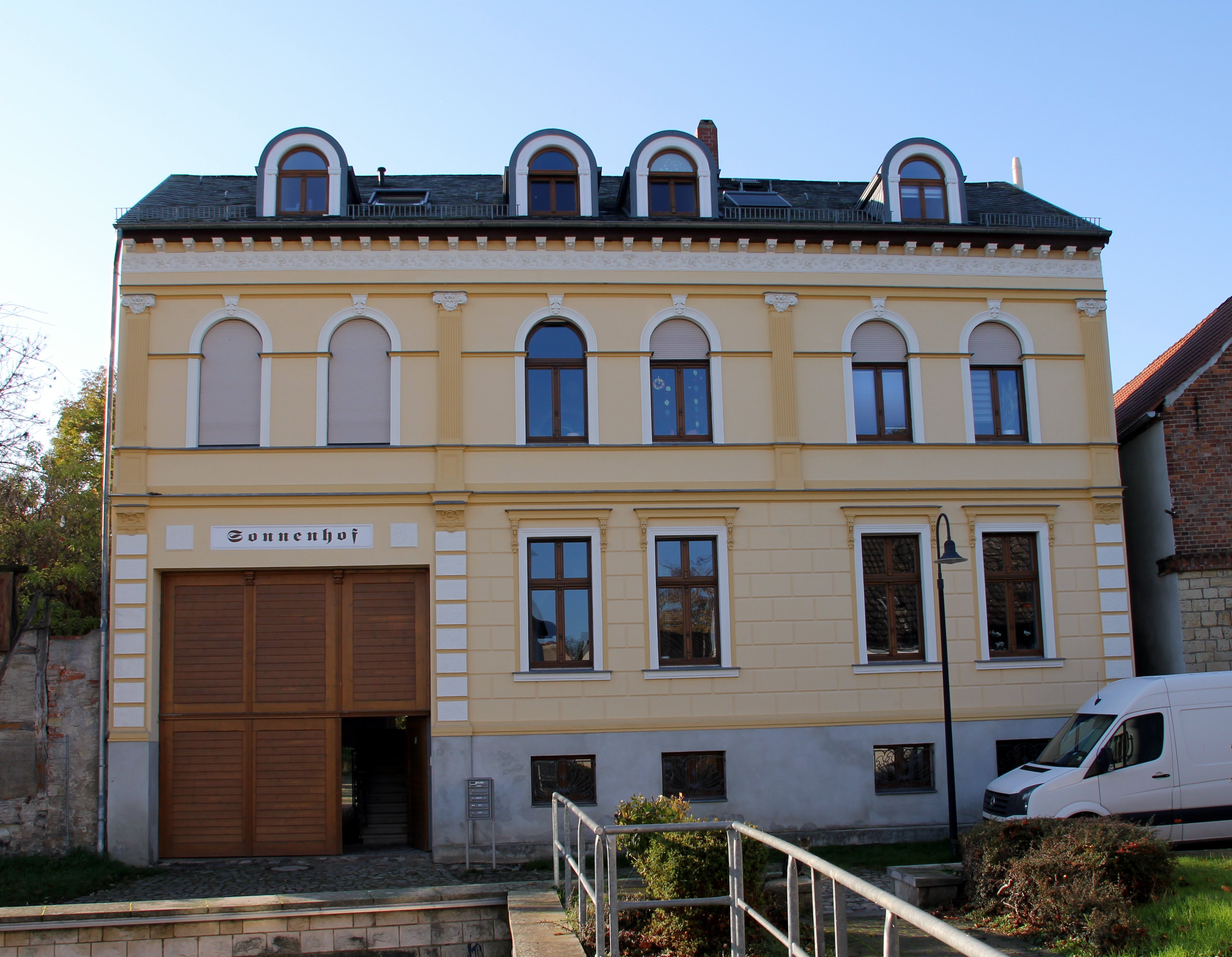 Gutshaus Zum Teich 4 Klein Rodensleben